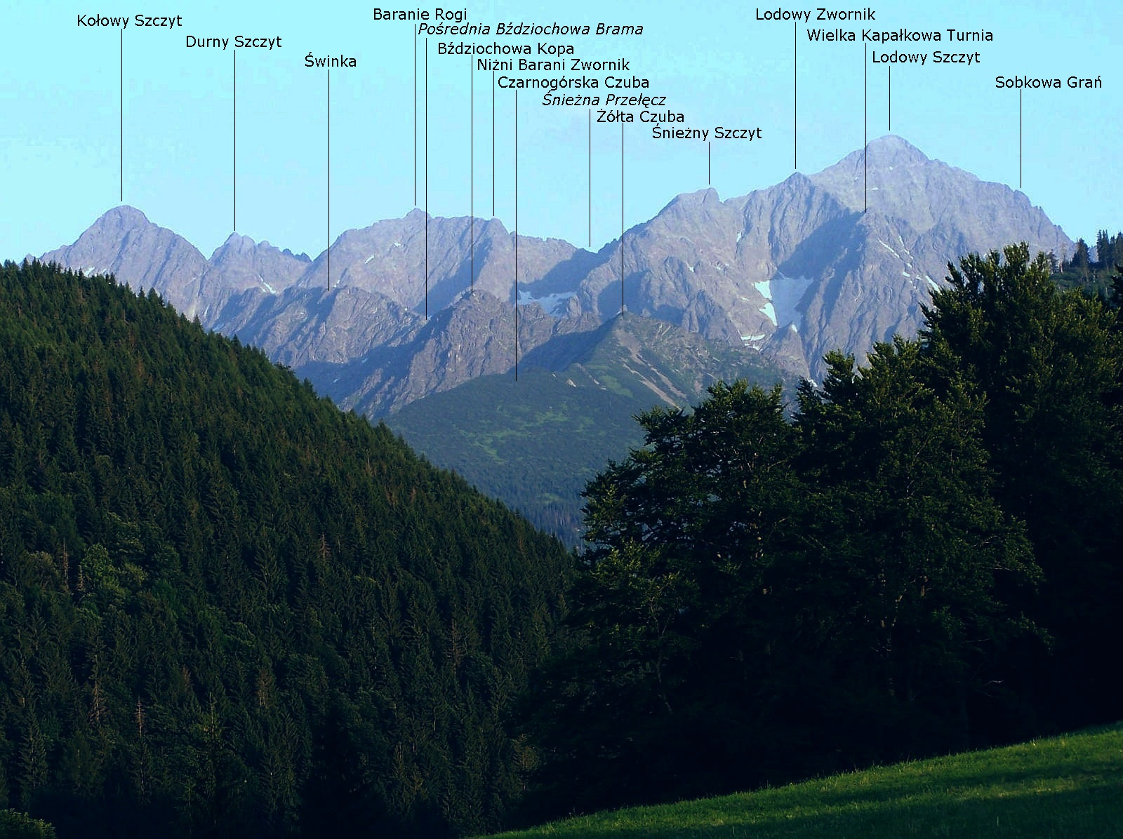 Szczyty i granie w otoczeniu Lodowego Szczytu